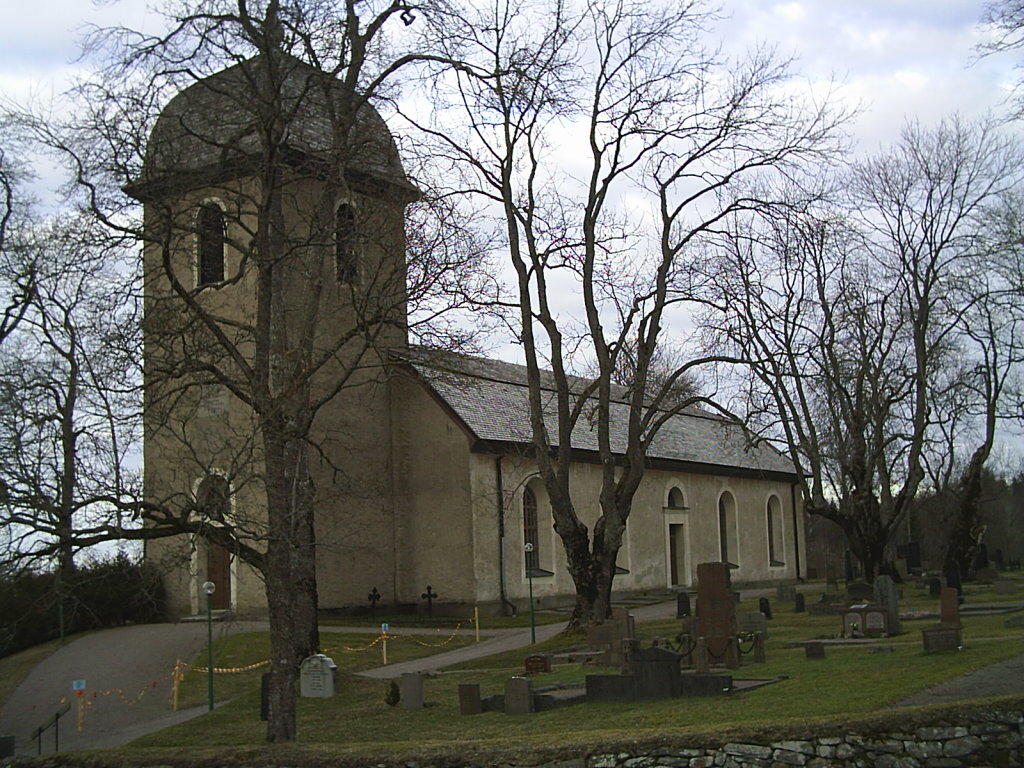 Kyrkan i Vassända-Naglums församling, Vänersborgs kommun